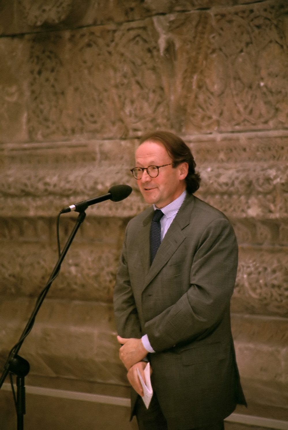 Peter-Klaus Schuster im Museum für Islamische Kunst vor der Mschatta-Fassade